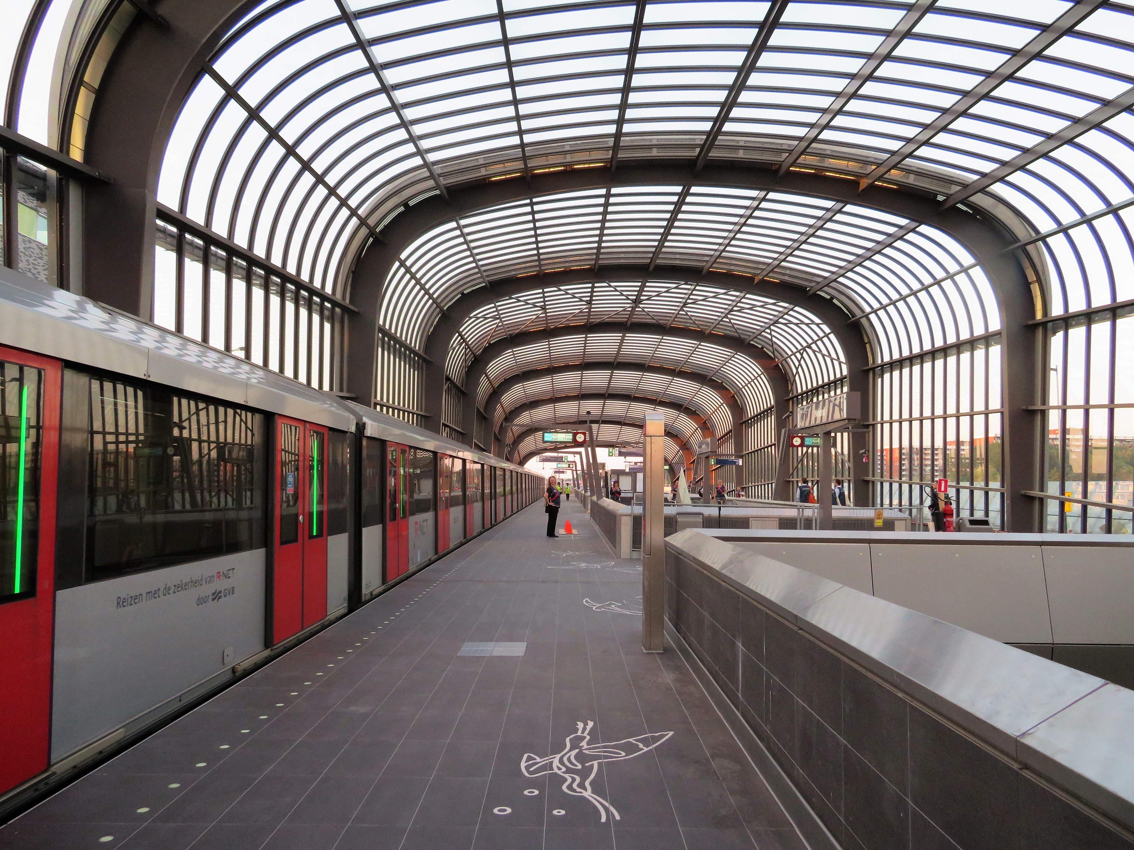 Metrostation Noord in Amsterdam, eindpunt van de Noord-Zuidlijn.